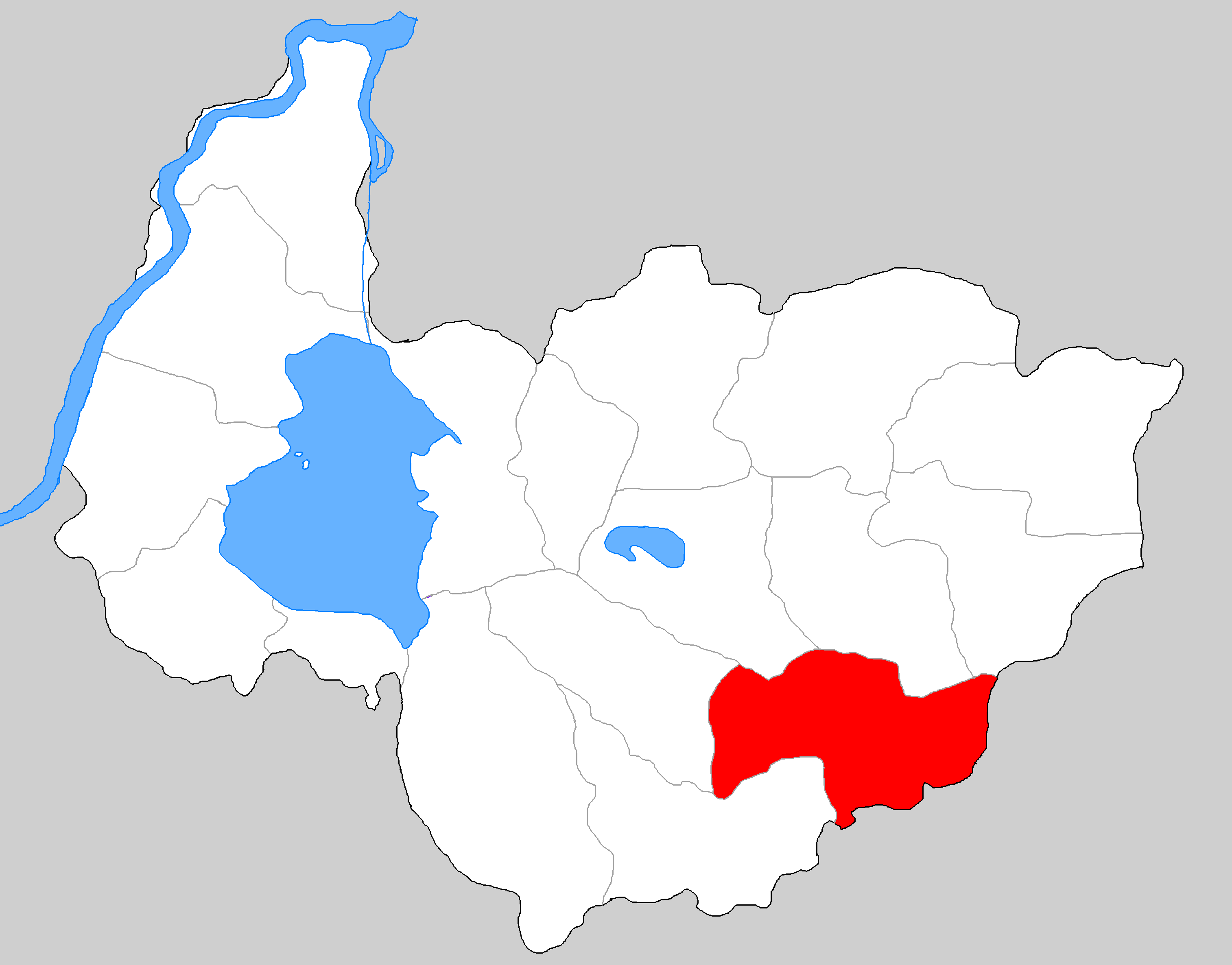 1993年东平县地图，其中红色表示当时的彭集镇。